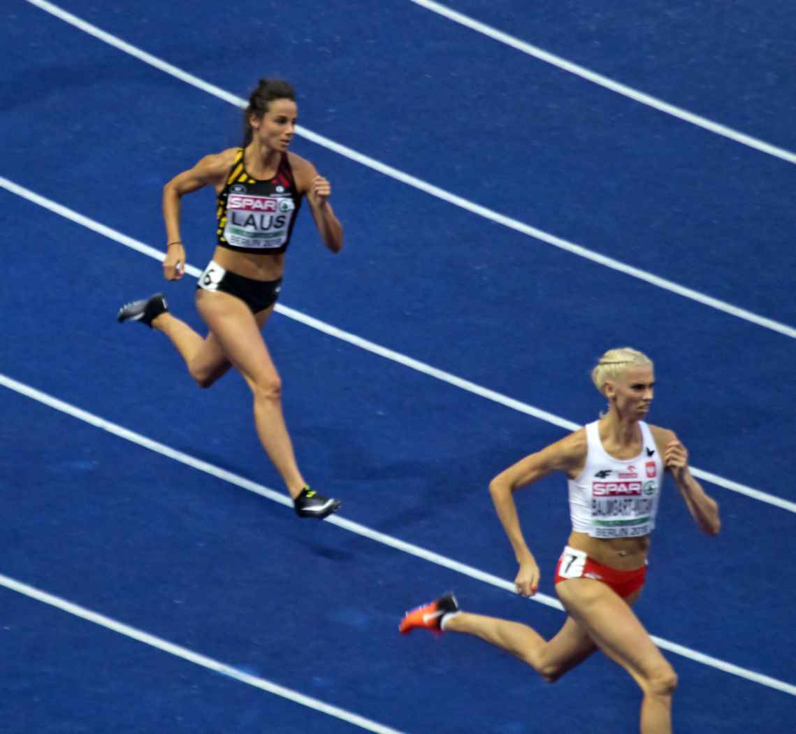 EKB31744 laus